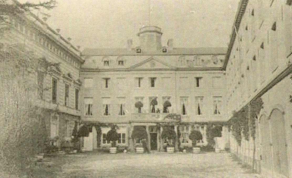 Scan eines alten Familienfotos